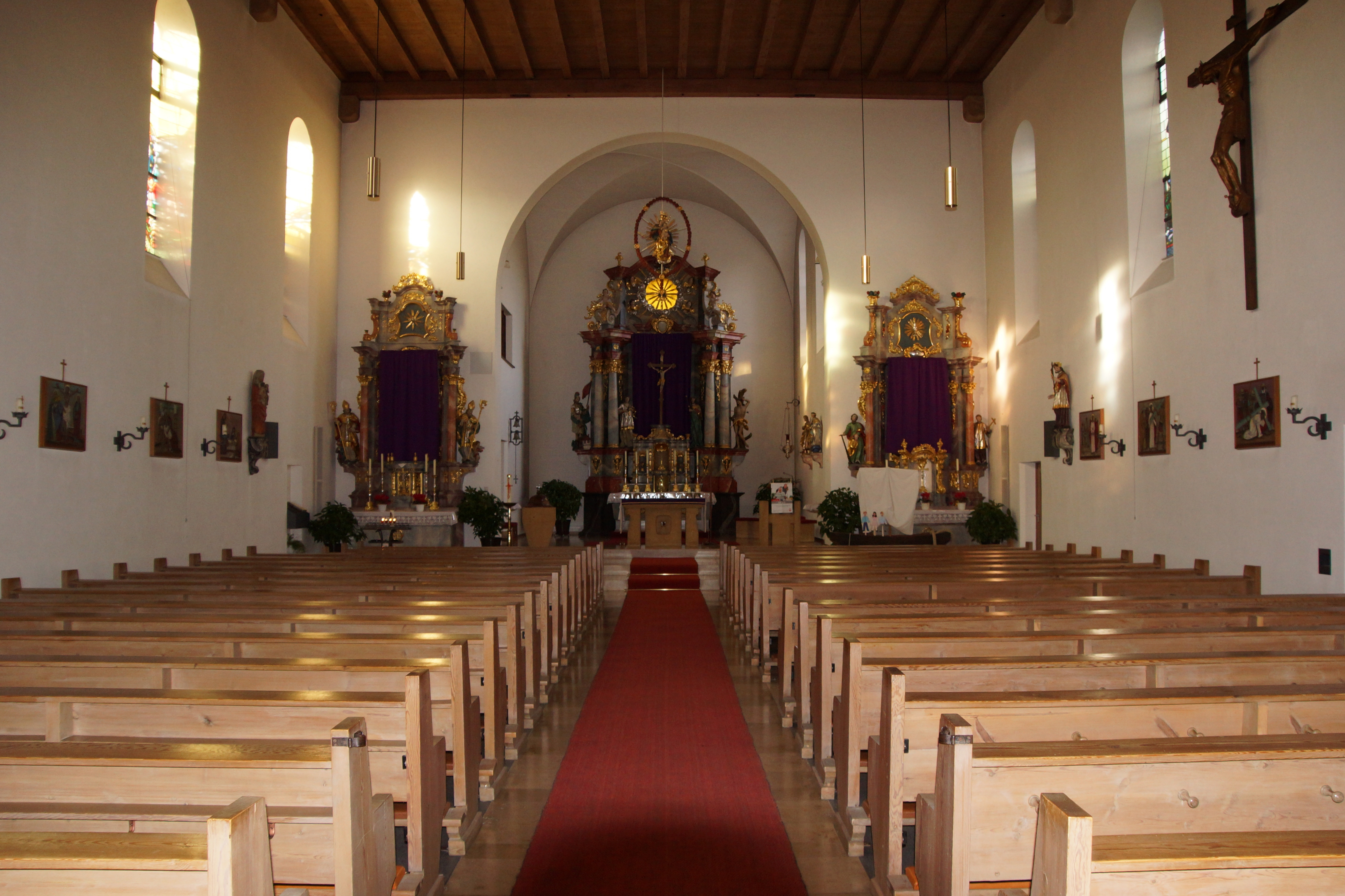 Die neue, 1932 errichtete, katholische Pfarrkirche St. Martin in Kaltenbrunn bei Weiherhammer.